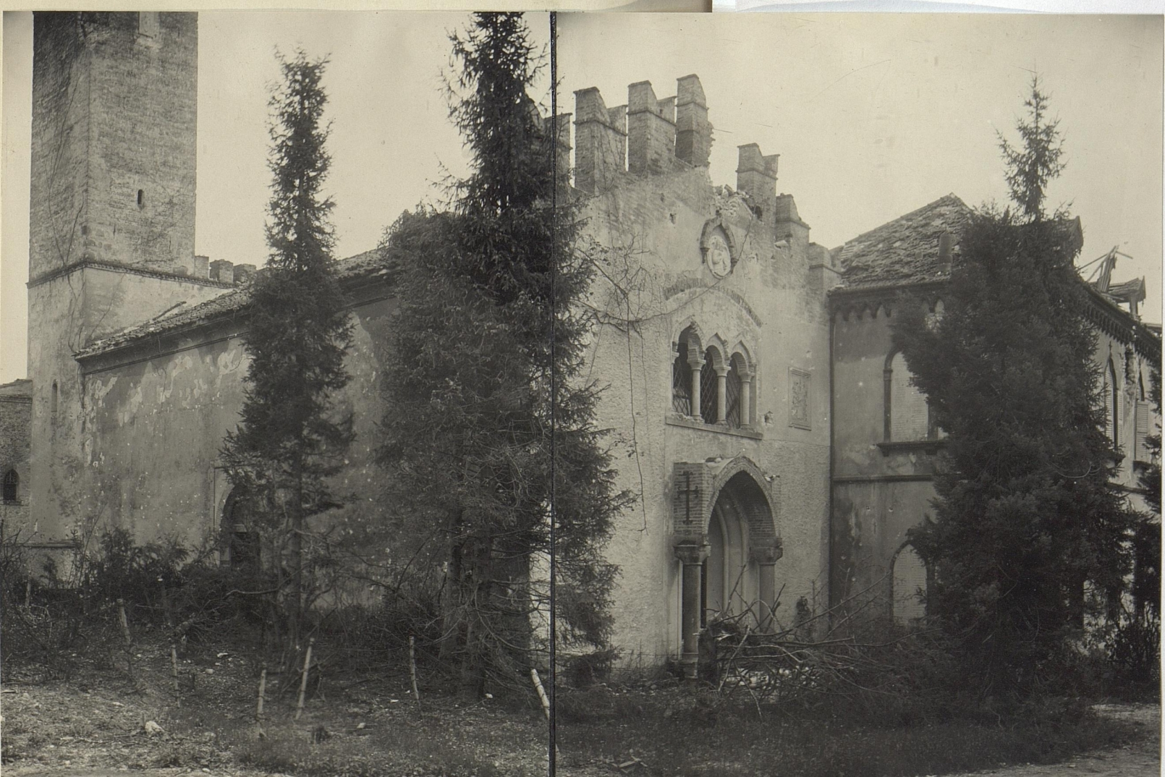 Abtei Santa Bona in Vidor